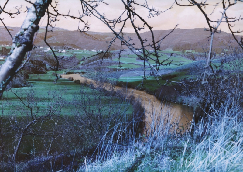 Imagen del Río Navia realizada por Wikier.